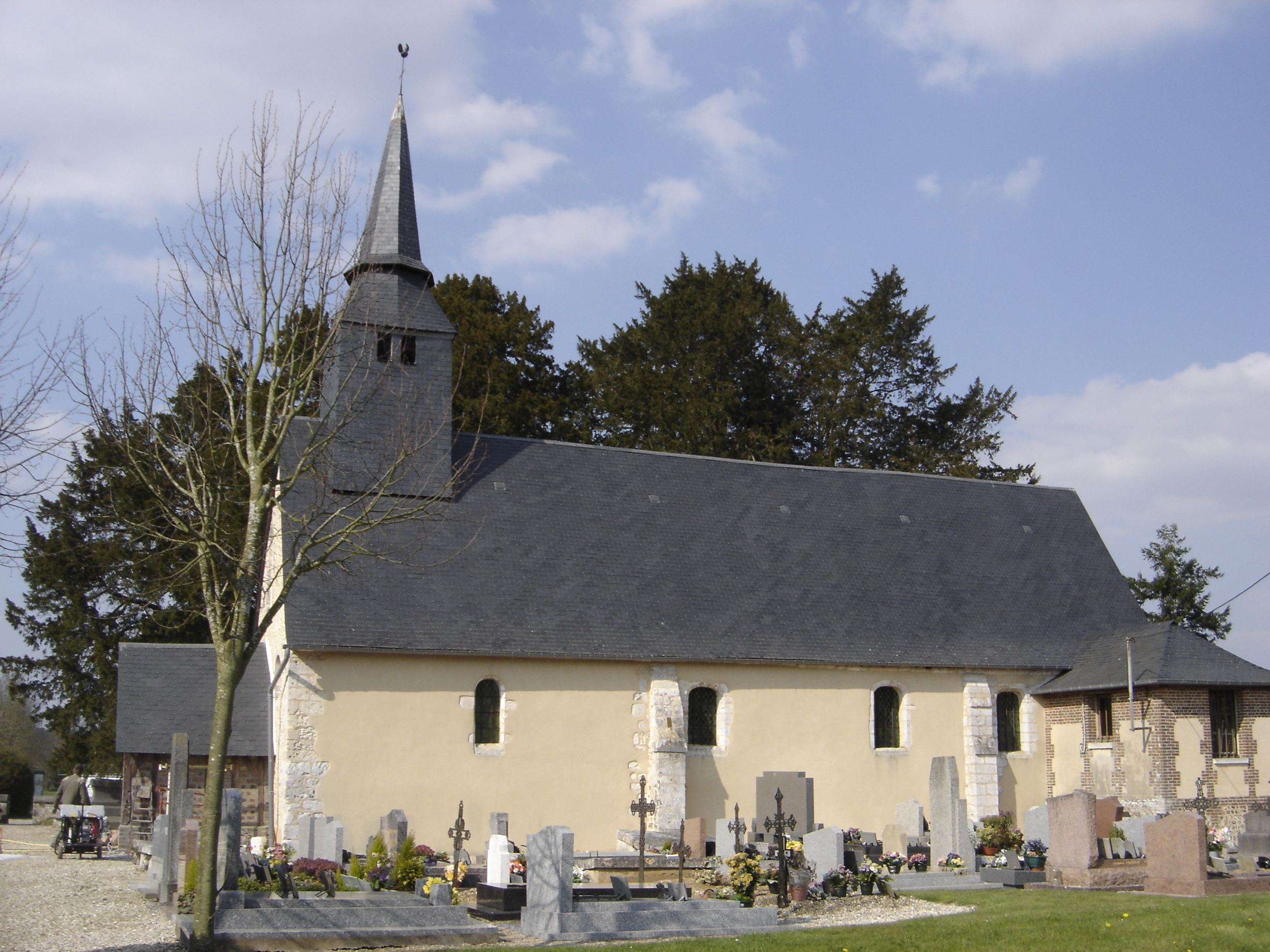 Église Notre-Dame à La Haye-de-Routot - Eure - France (les ifs millénaires en arrière-plan).